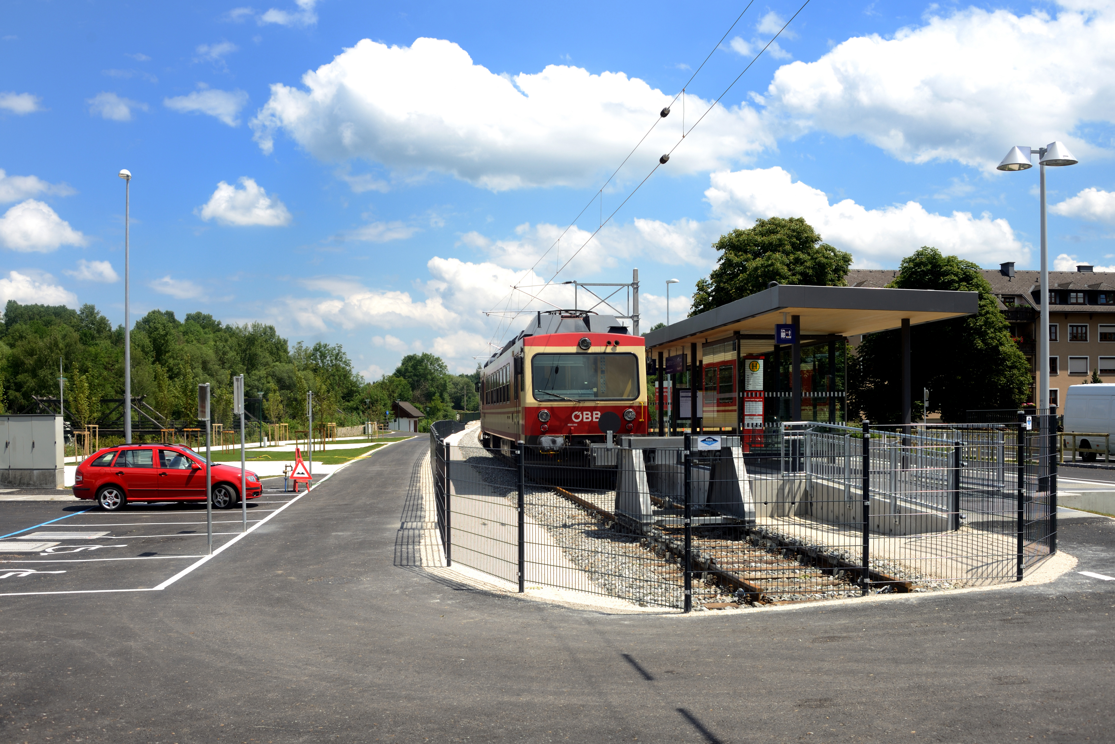 Gleisende bei der Bahnhaltestelle Kammer-Schörfling